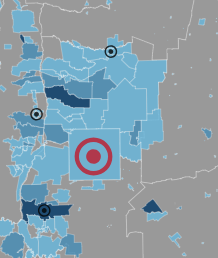 Mapa que muestra los municipios que integran el Gran Córdoba y su densidad poblacional.